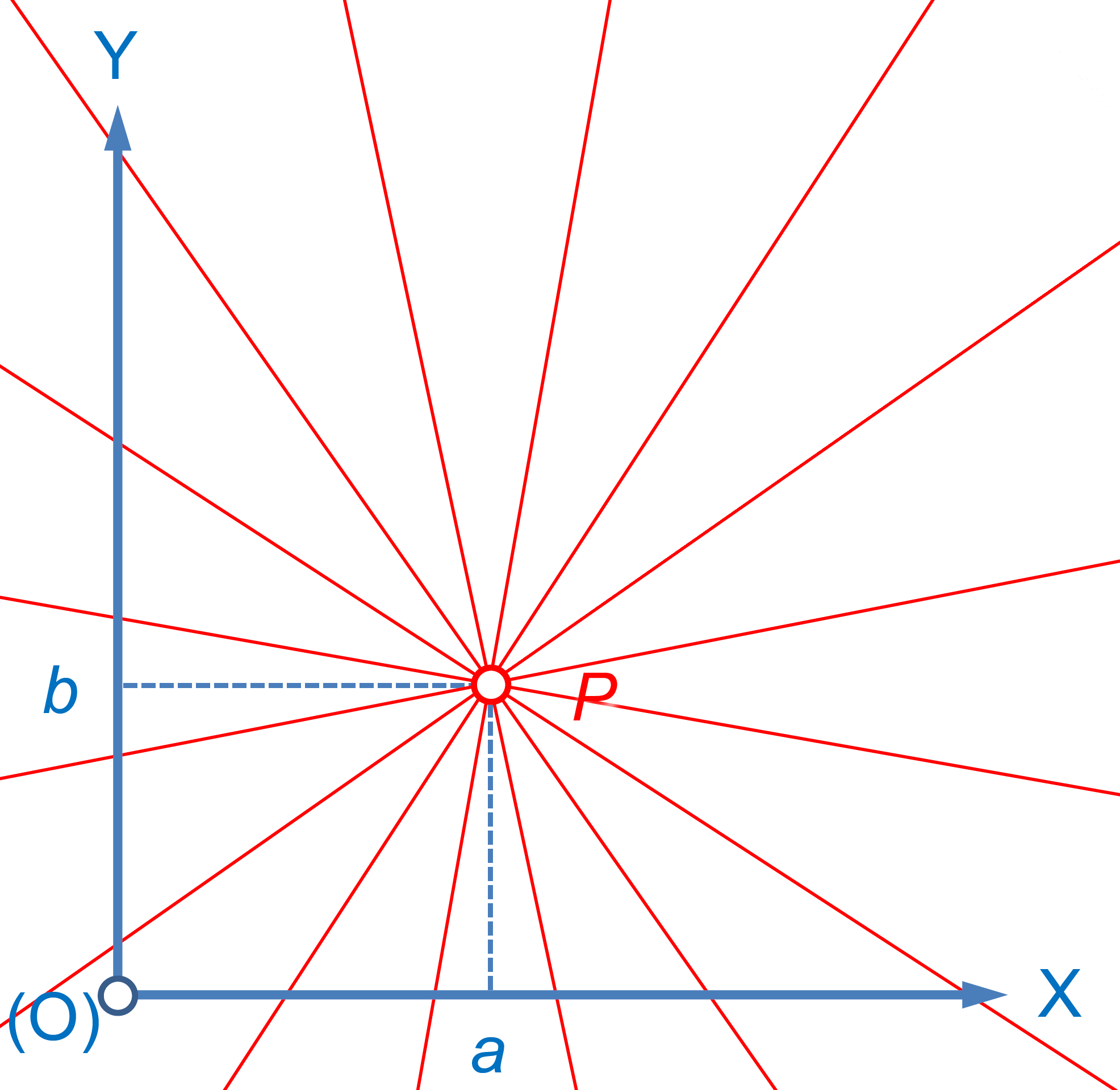 Haz de rectas que pasan por el punto P (a, b), definido por la expresión λ(x-a)-(y-b)=0; o lo que es igual, λx-y+(b-λa)=0 (para cualquier λ real)